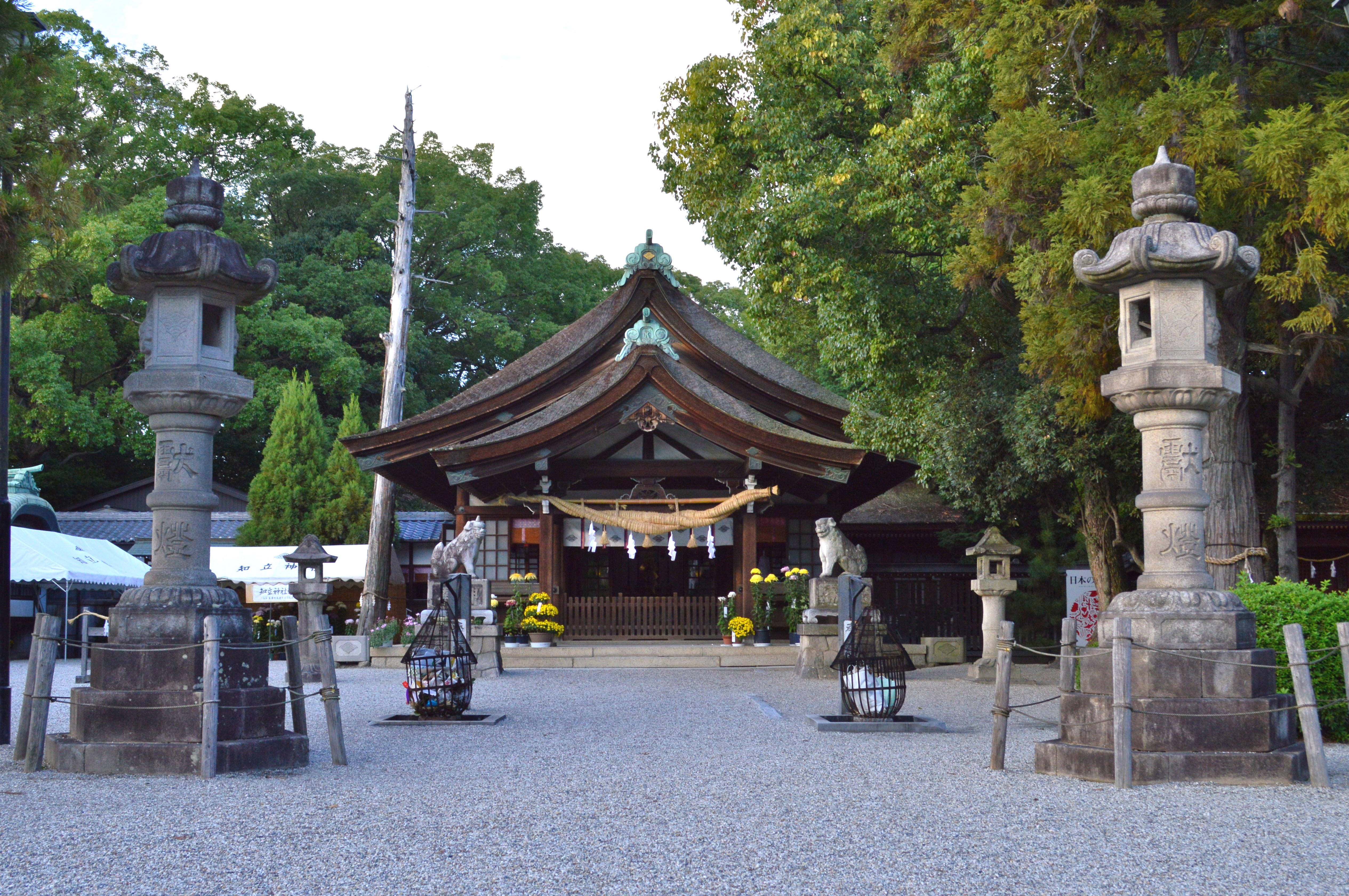 知立神社 拝殿